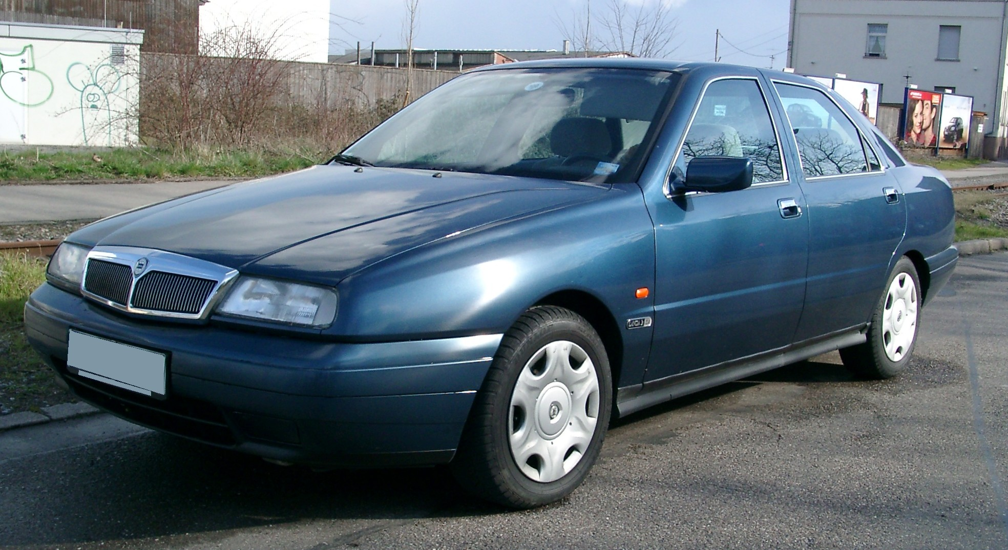 Lancia Kappa Limousine